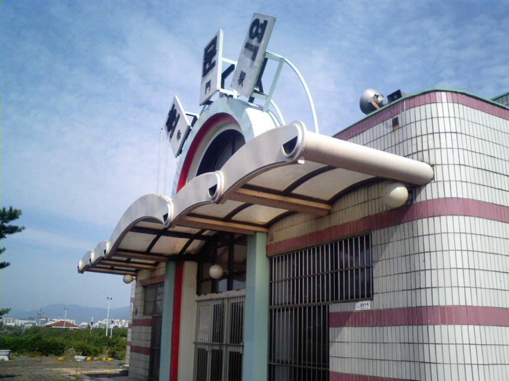 동해남부선 효문역